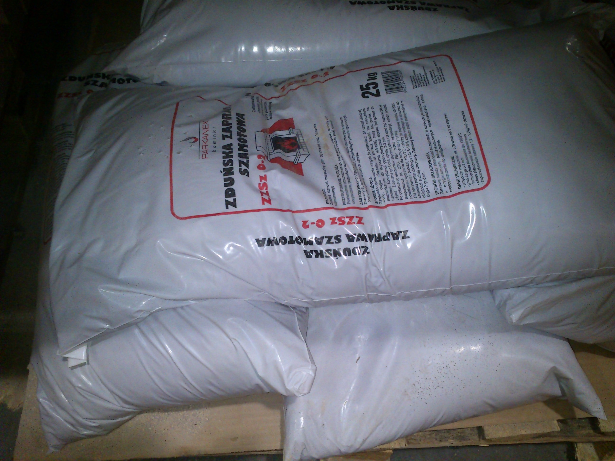 zdjęcie zaprawy zrobione w supermarkecie